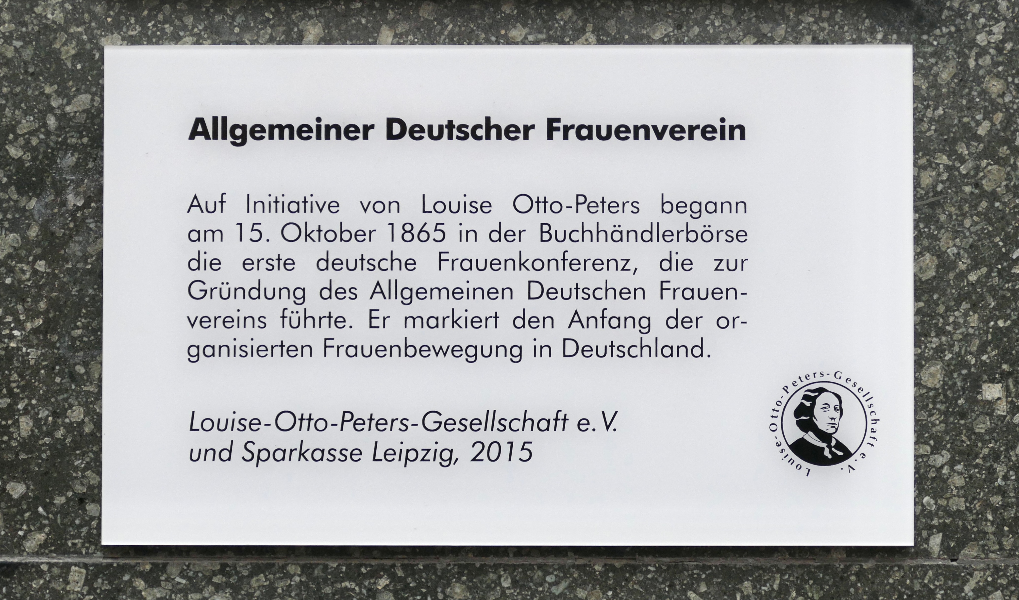 Hinweis-Tafel in Leipzig, Ritterstraße 12: Hier nahm am 15. 10.1865 die Deutsche Frauenbewegung ihren Anfang